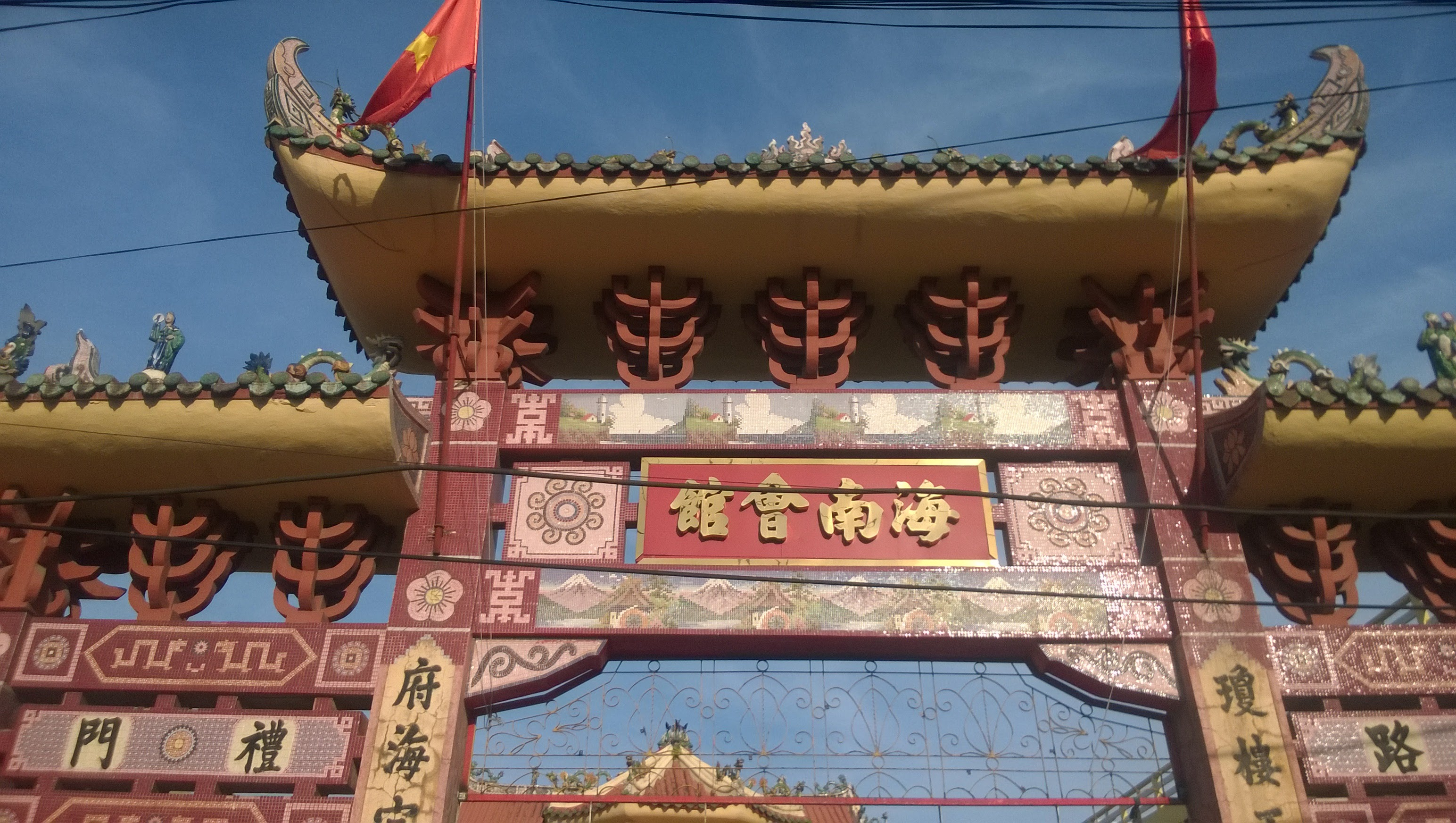 Chiêu Ứng tự, Thạc Gián, Thanh Khê, Đà Nẵng